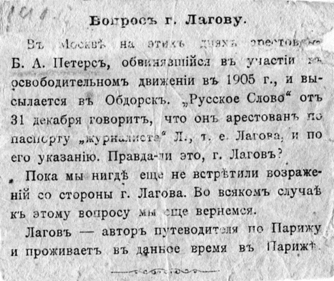 Газеты об аресте Б.А. Петерса, 1911г.